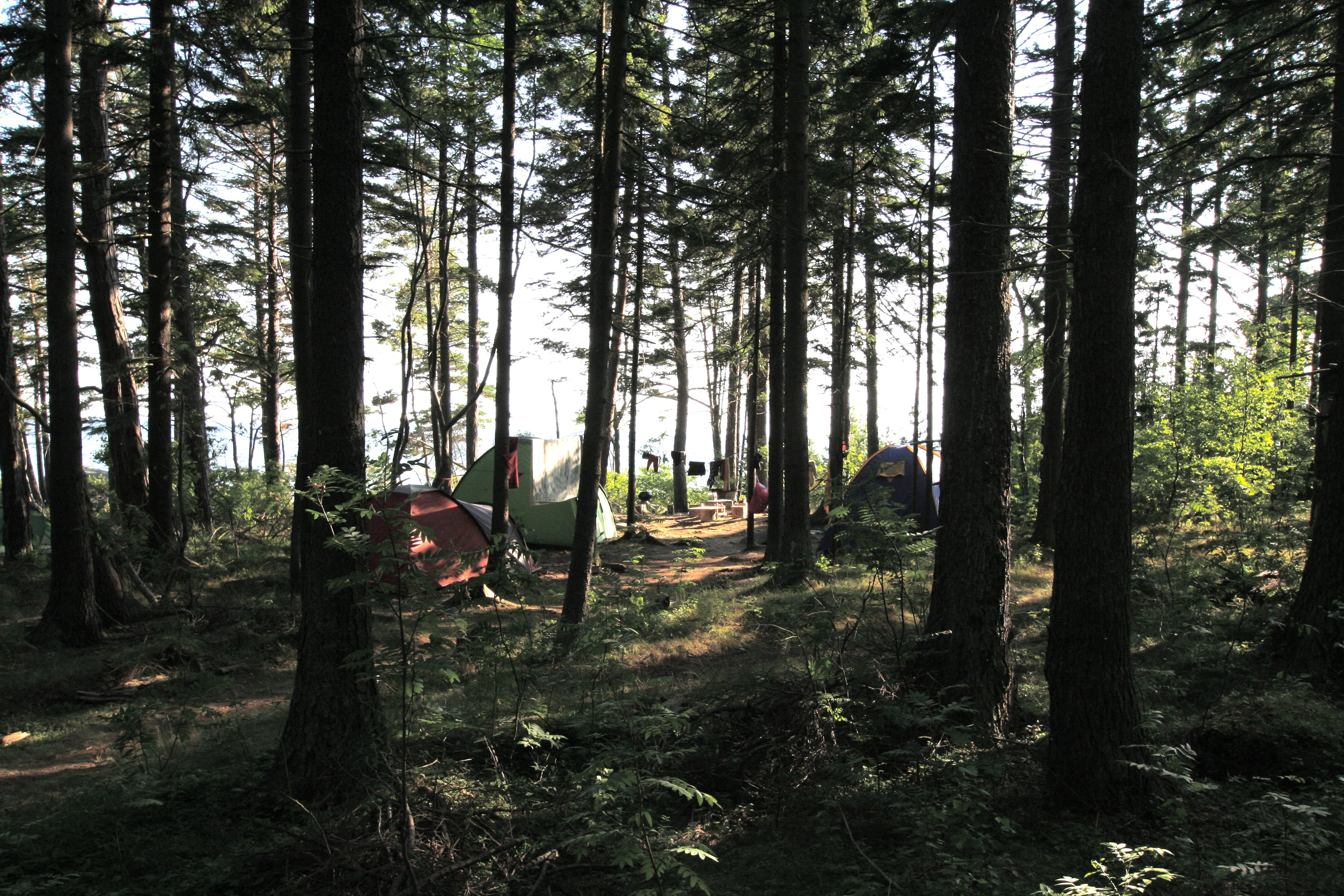 Telttoja Sipoon Kaunissaaressa